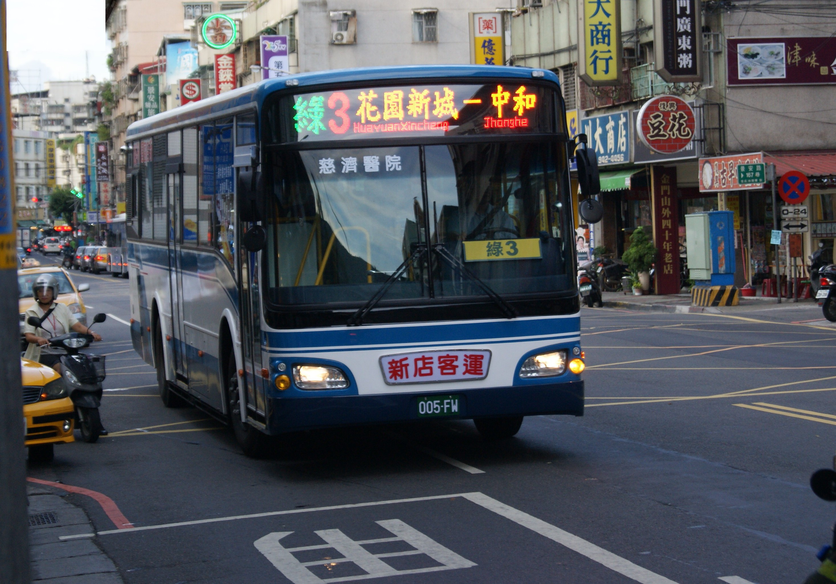 新店客運2011年日野大客車005-FW行駛台北捷運接駁公車綠3線